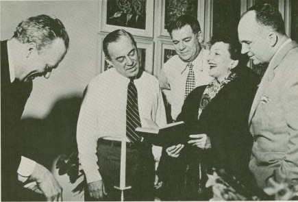 From left: Joshua Logan, Richard Rodgers, Oscar Hammerstein II, Mary Martin, James Michener.